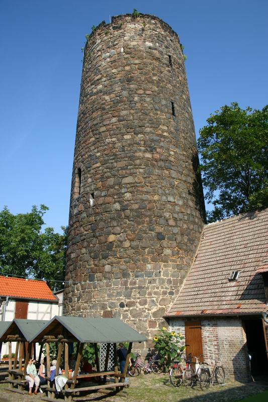 Loburg Bergfried